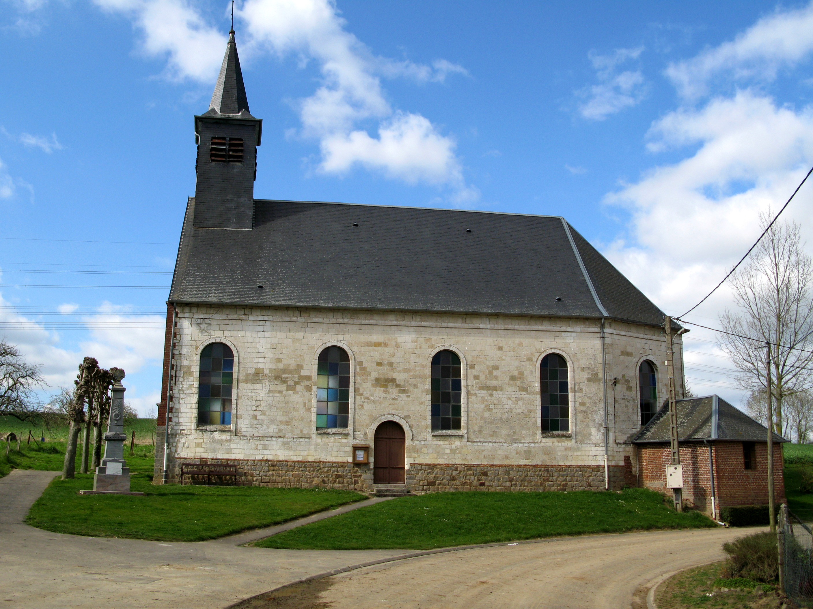 Harponville (Somme, France) - L'église et le monument aux morts.